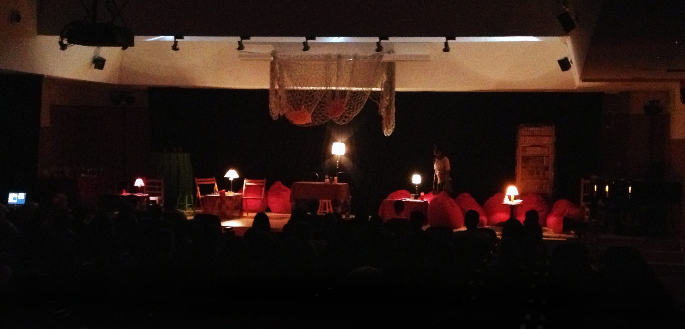 'Café Libertade', obra de Fernando da Costa. Con el Aula de Ourense en la Facultad de Geografía e Historia de la UB en el marco del V Festival MUTIS de teatro independiente de Barcelona.